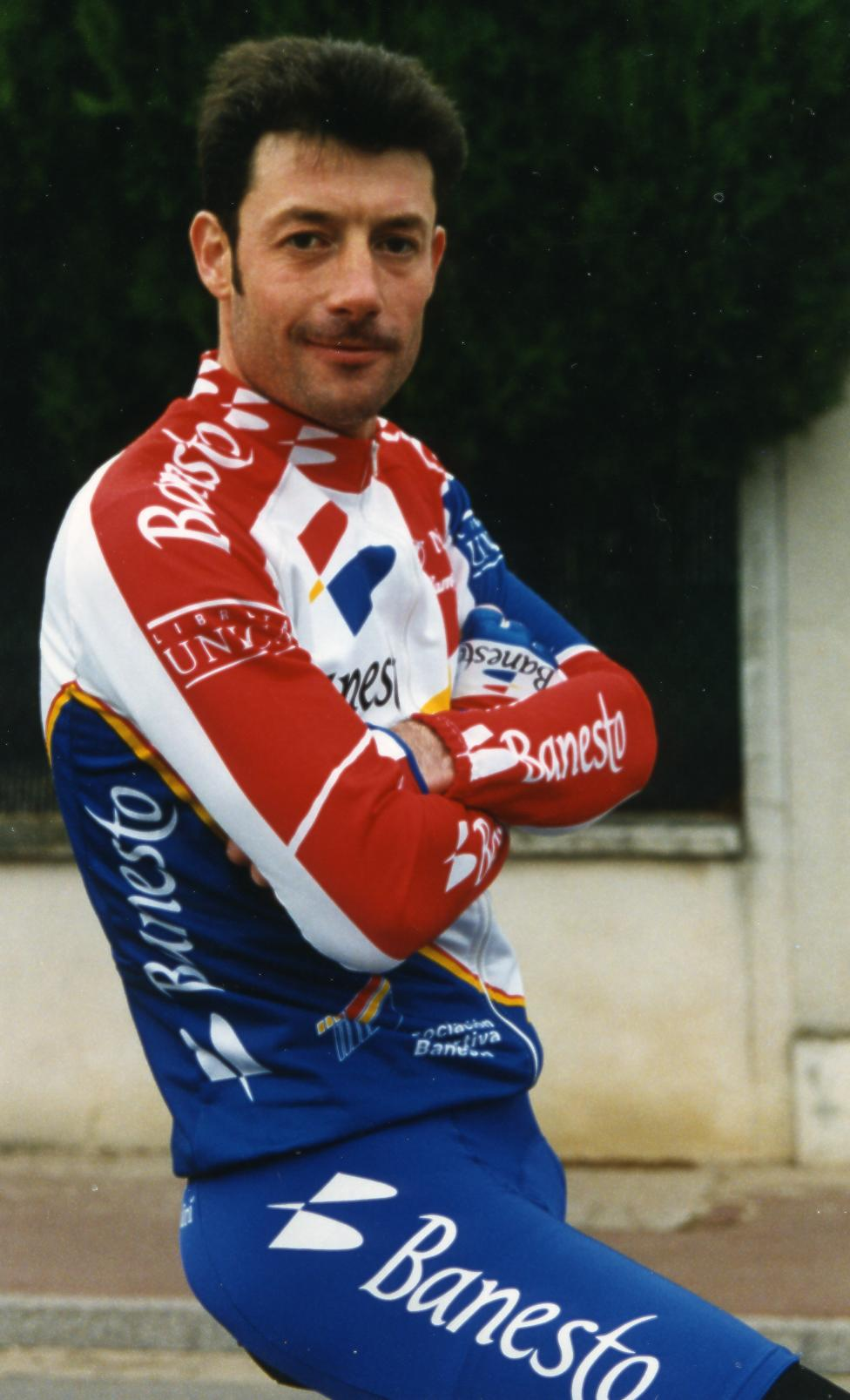 A LAMOTTE-BEUVRON AU JUBILE DE PATRICE ESNAULT